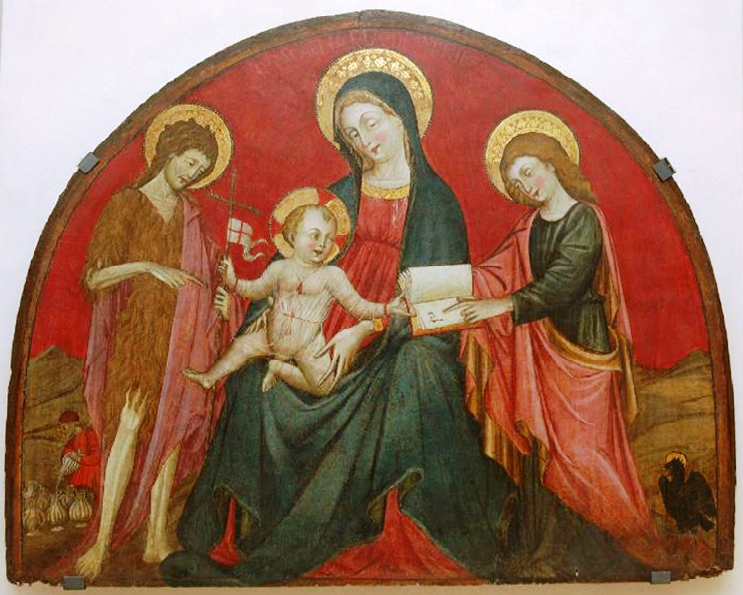 Dipinto di Giovanni da Gaeta, attualmente nel Museo diocesano di Gaeta.